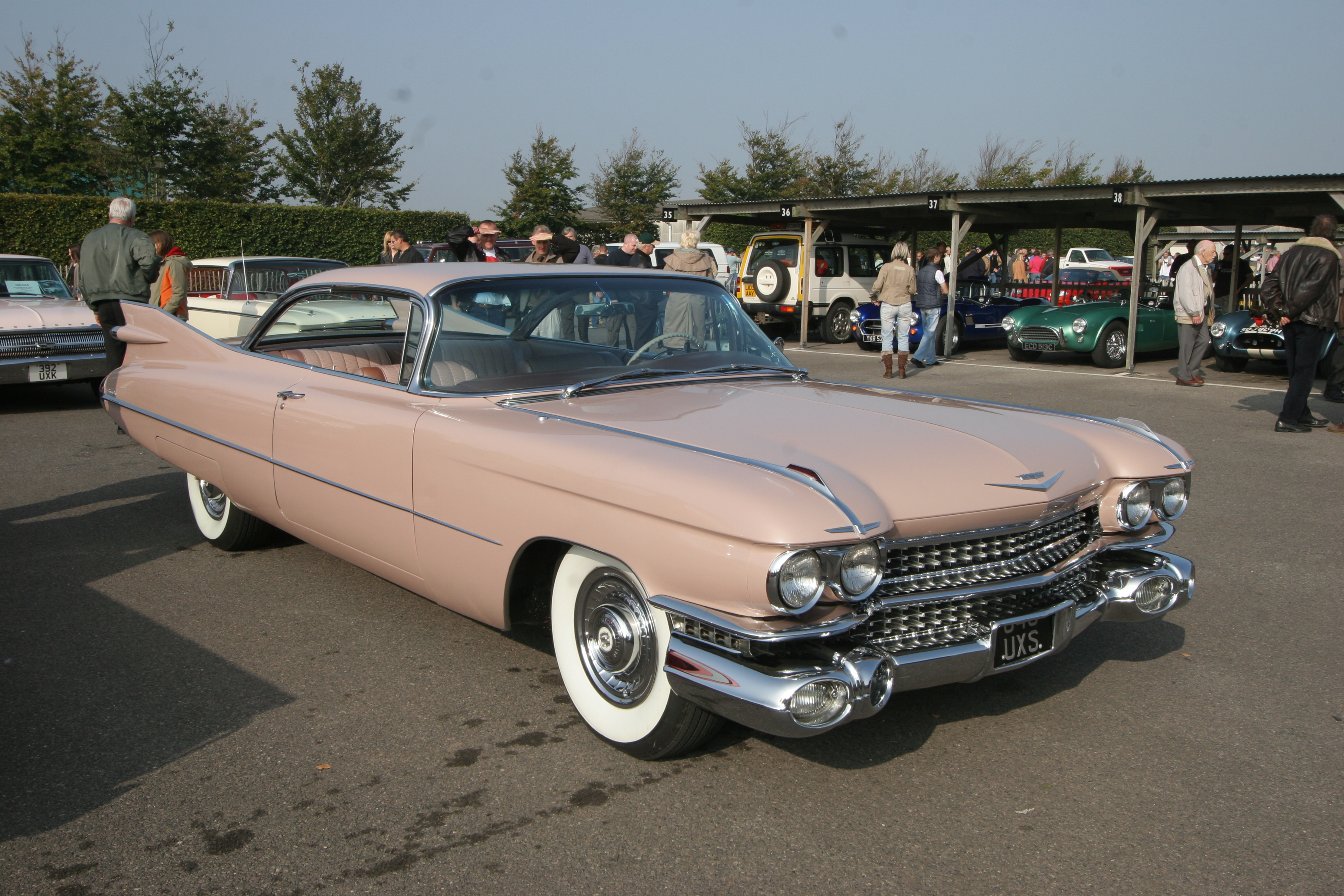 Goodwood Breakfast Club - Cadillac Eldorado